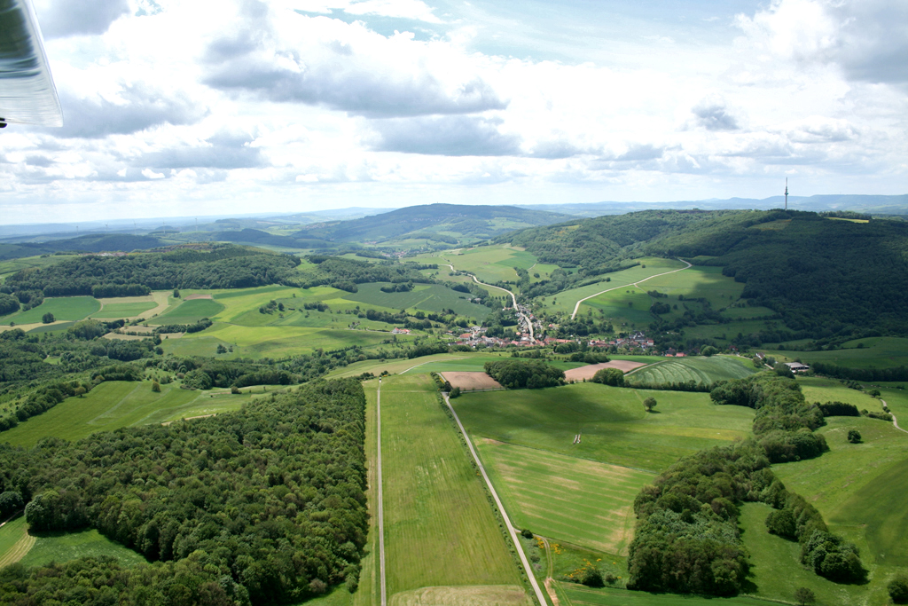 Blick auf die Landebahn (Richtung 23) des Flugplatzes Eßweiler. Im Hintergrund der Ort Eßweiler gefolgt vom Schneeweiderhof und dessen Funkturm.